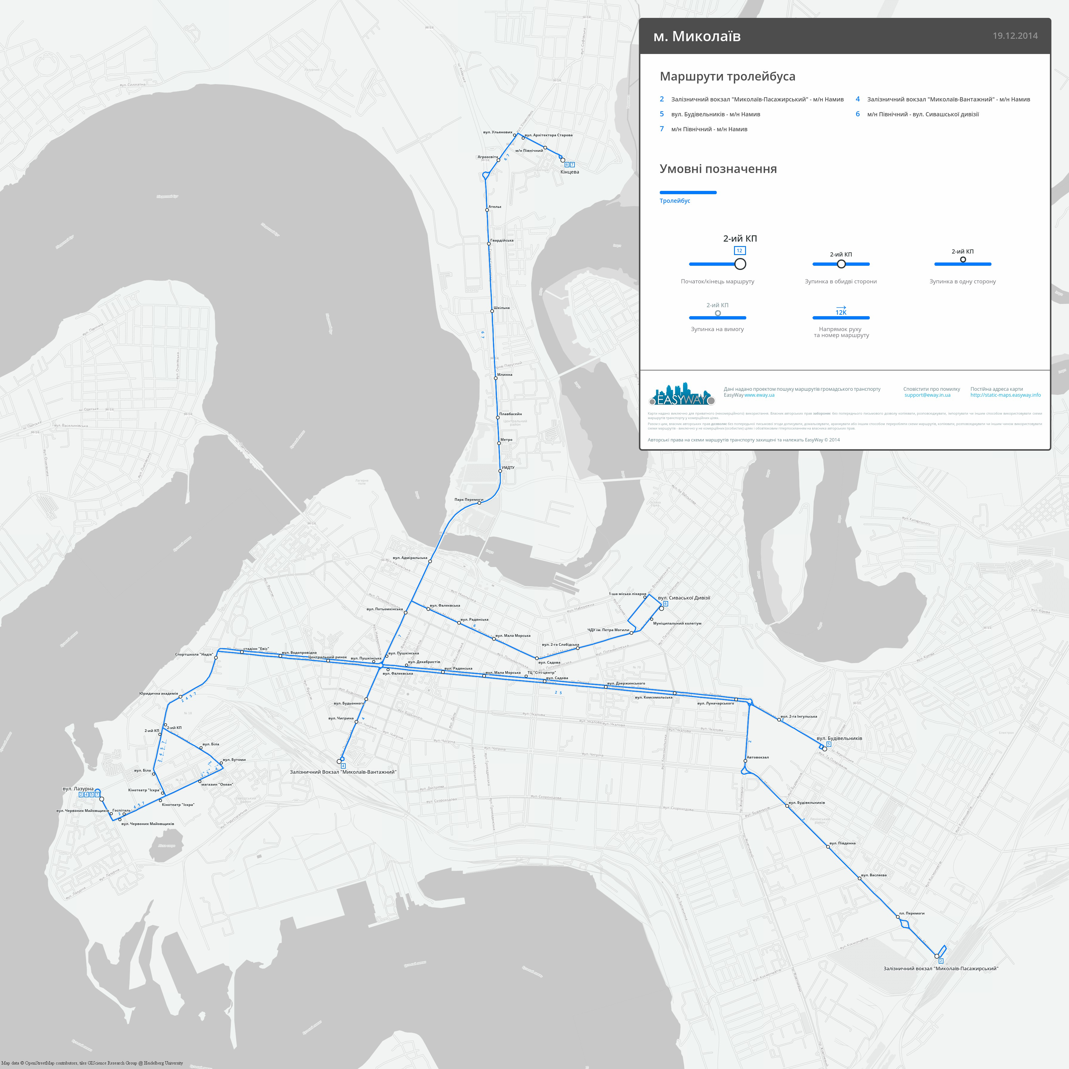 Схема тролейбусних маршрутів у місті Миколаїв